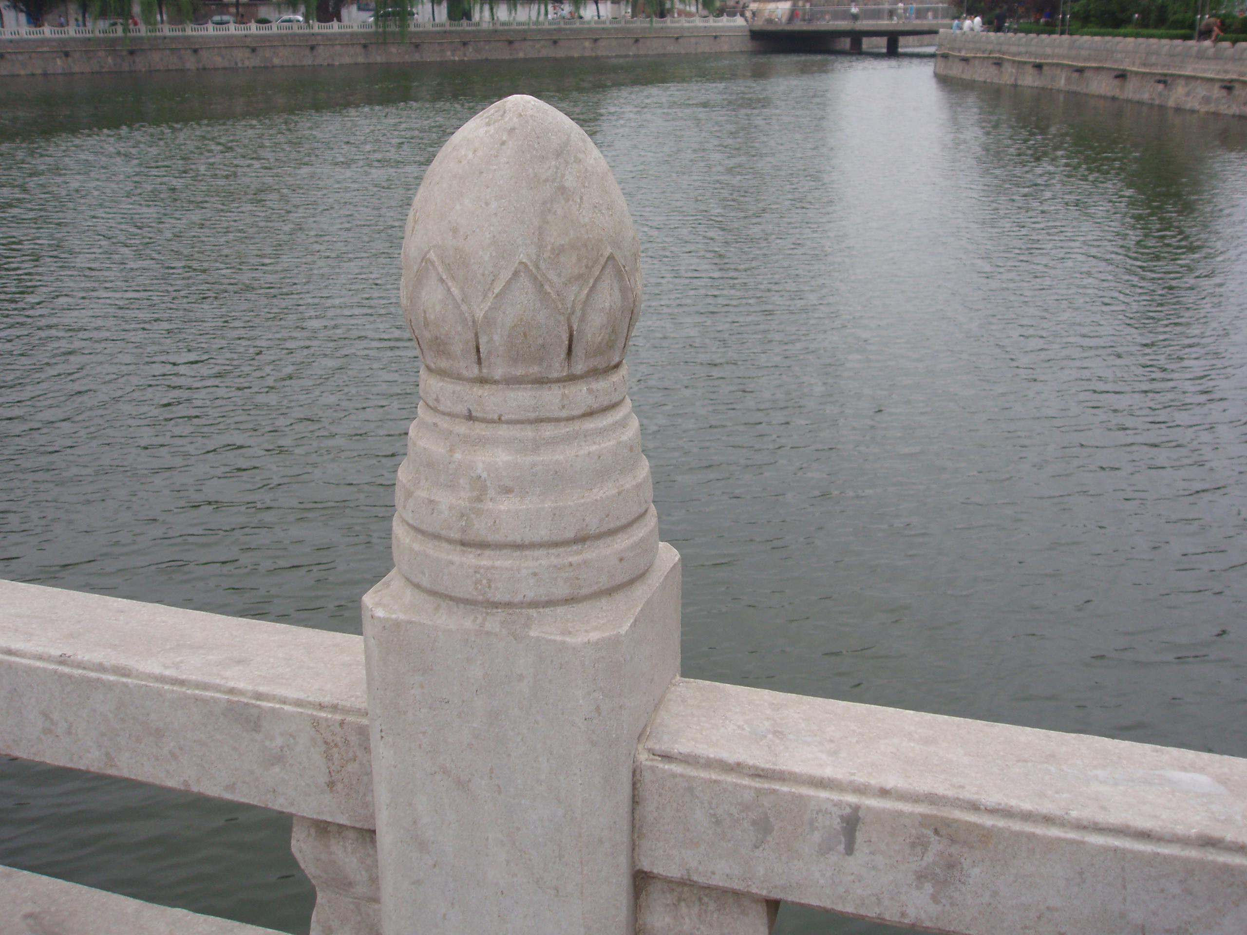 Marble made baluster